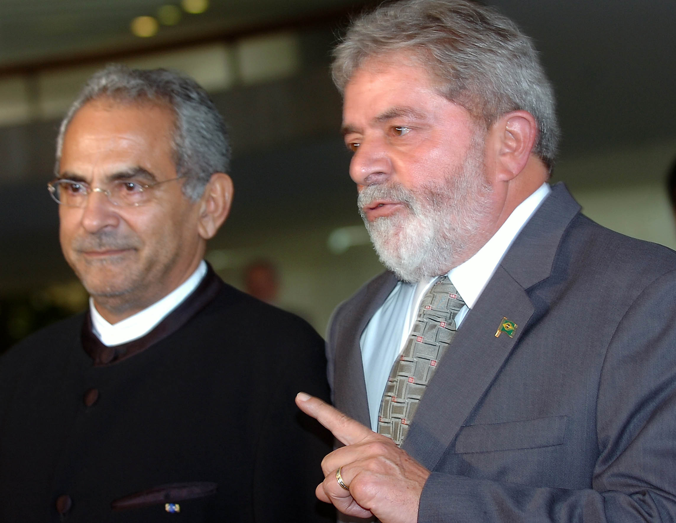 East Timor President José Ramos Horta and Brazilian President Luiz Inácio Lula da Silva